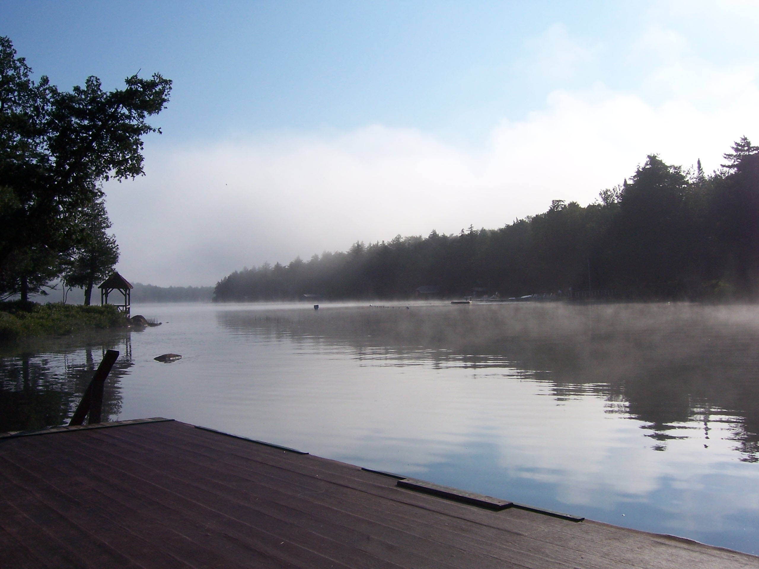 Big Moose Lake NY USA